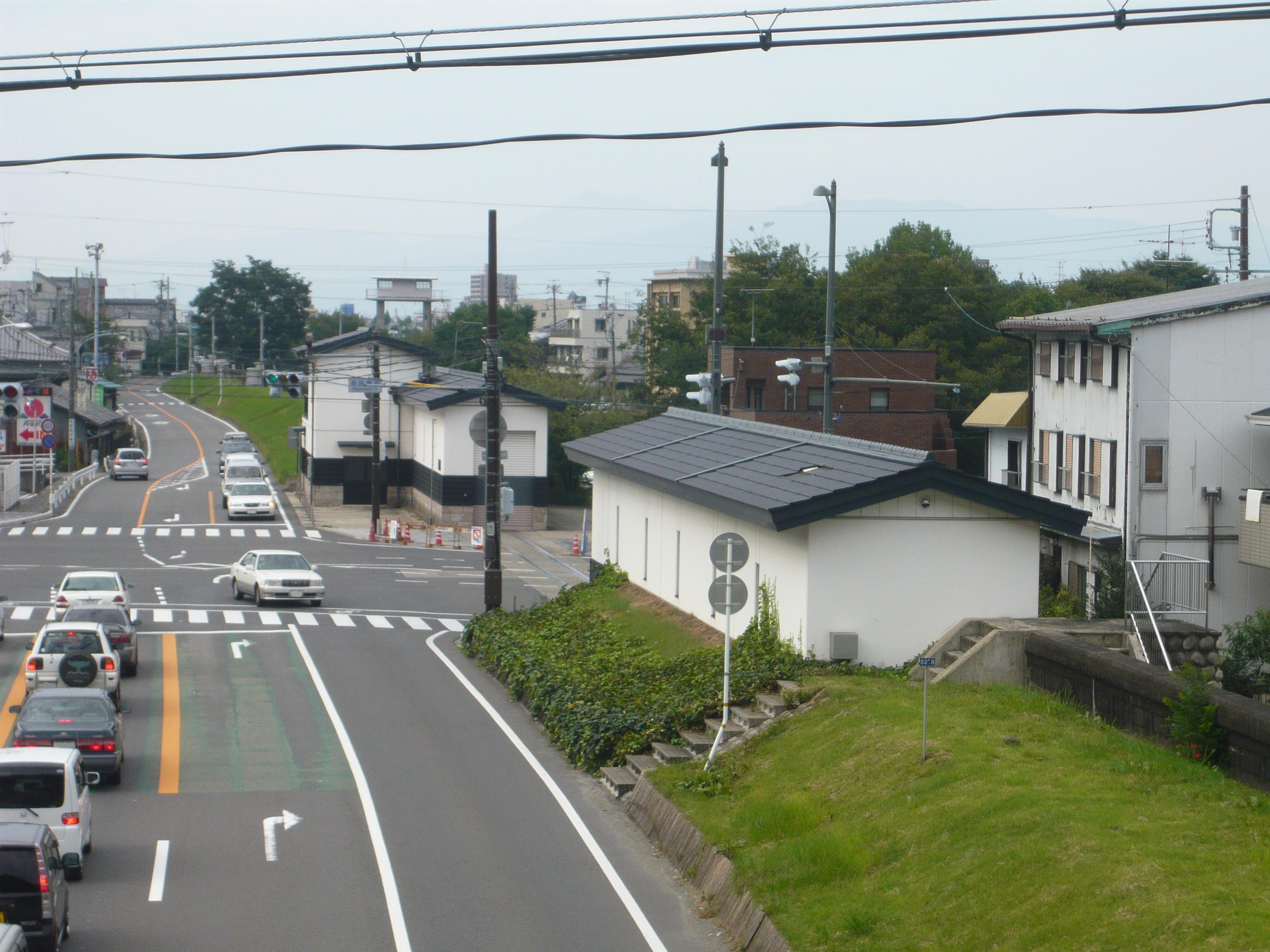 Nagarabashi Gate 大宮陸閘（長良橋陸閘）,Gifu,Gifu,Japan（岐阜県岐阜市）で撮影。